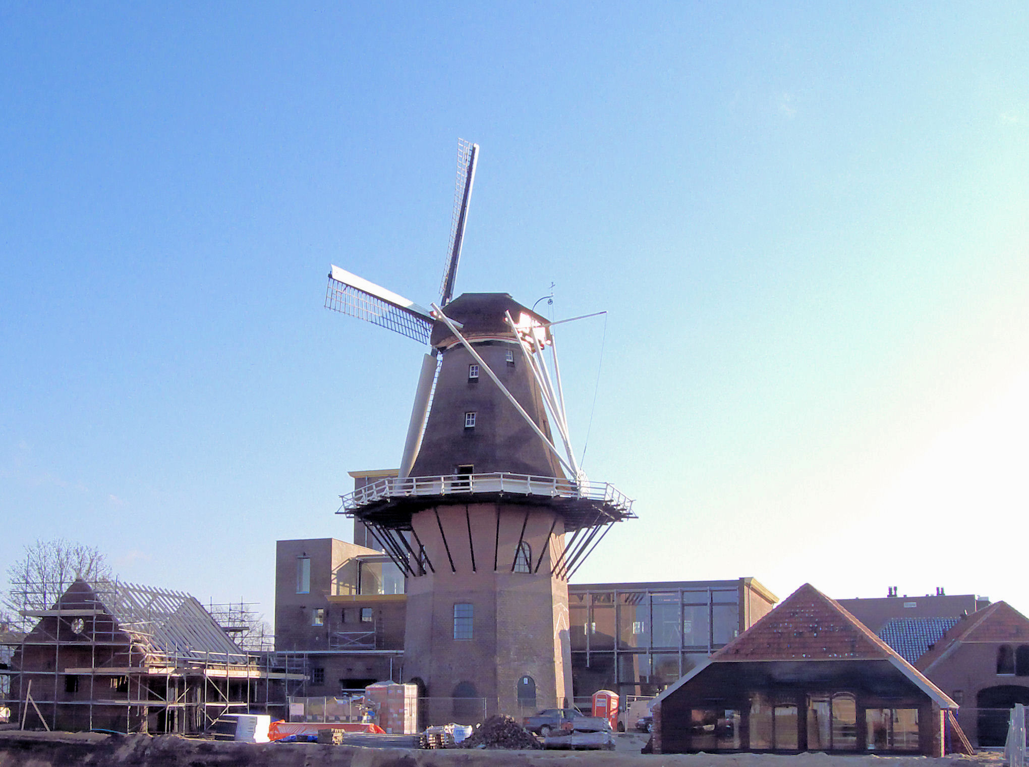 Concordia molen, Ede met links met open dak de maalschuur met daarin de door een dieselmotor aangedreven maalstoel